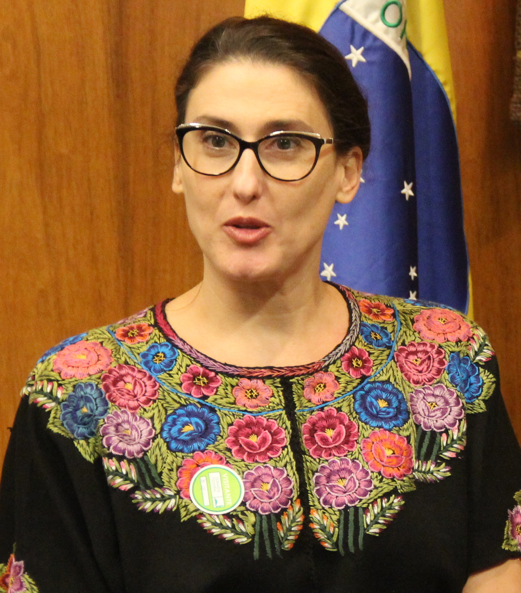 Nesta terça-feira (15.05), o presidente da Câmara, Rodrigo Maia, recebeu parlamentares e representantes dos movimentos sociais para discutir a tramitação do Projeto de Lei 6299/02 que pode ser votado em breve na Comissão Especial.